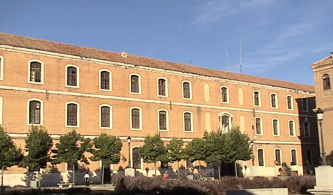 Fachada principal del antiguo Cuartel del Príncipe, en Alcalá de Henares (Comunidad de Madrid - España). Actualmente se denomina Edificio Cisneros, y es la sede el Centro de Recursos para el Aprendizaje y la Investigación (CRAI) y del Museo de Arte Iberoamericano.